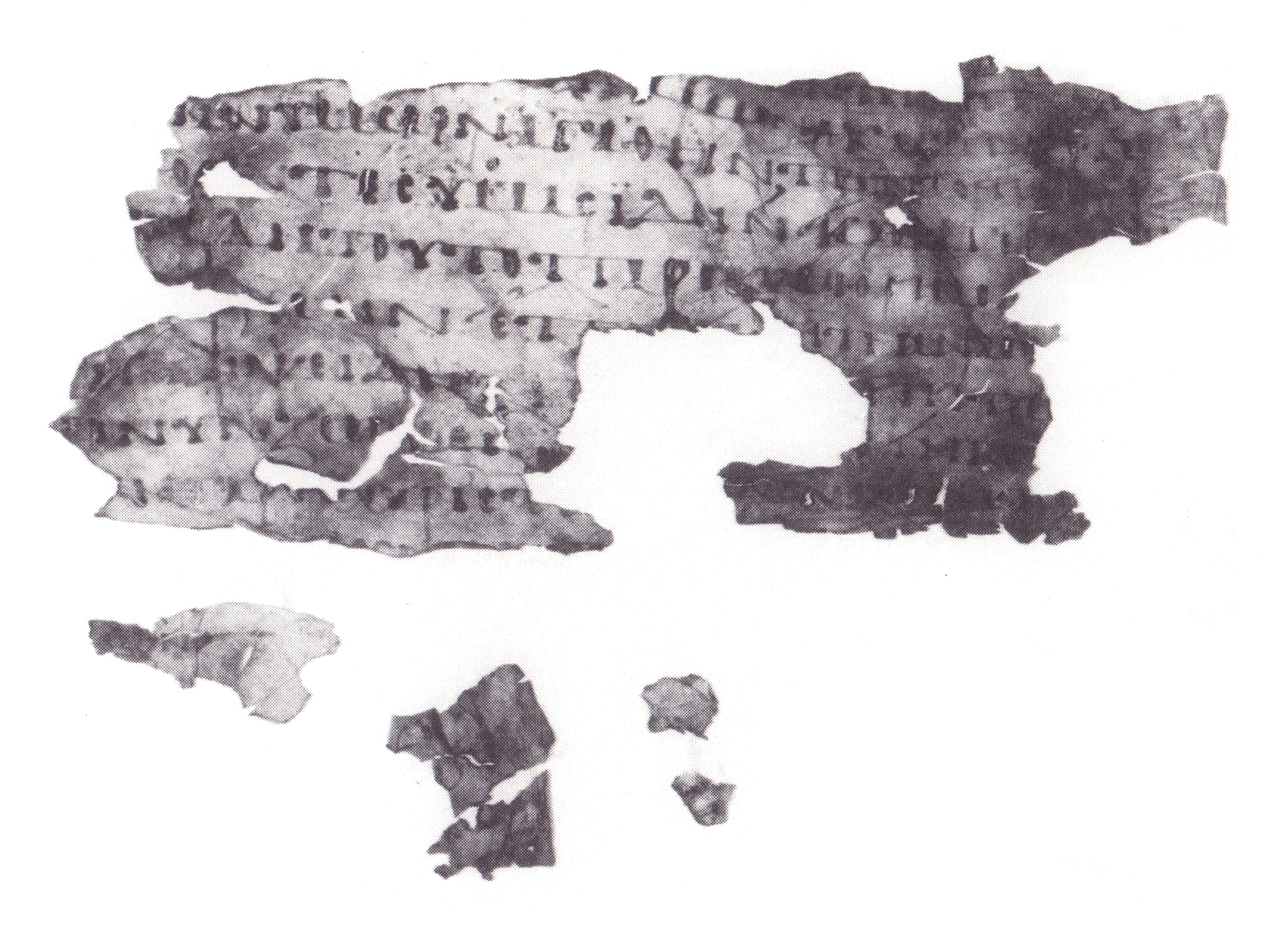 Uncial 0183 (Gregory-Aland), manuscript of the New Testament, side recto with the Text of 1 Thess 3:6-9.